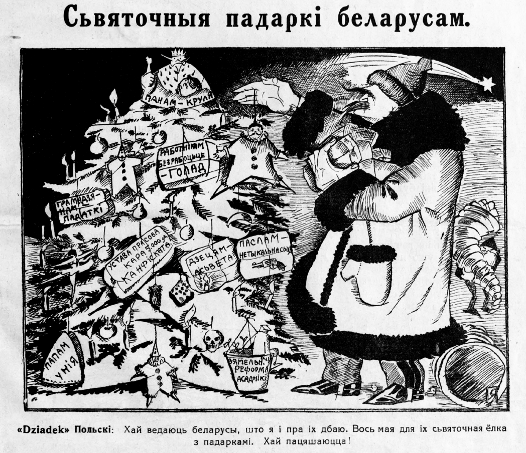 Беларуская (тарашкевіца): Карыкатура на Юзэфа Пілсудзкага ў часопісе Маланка №17, 1926.